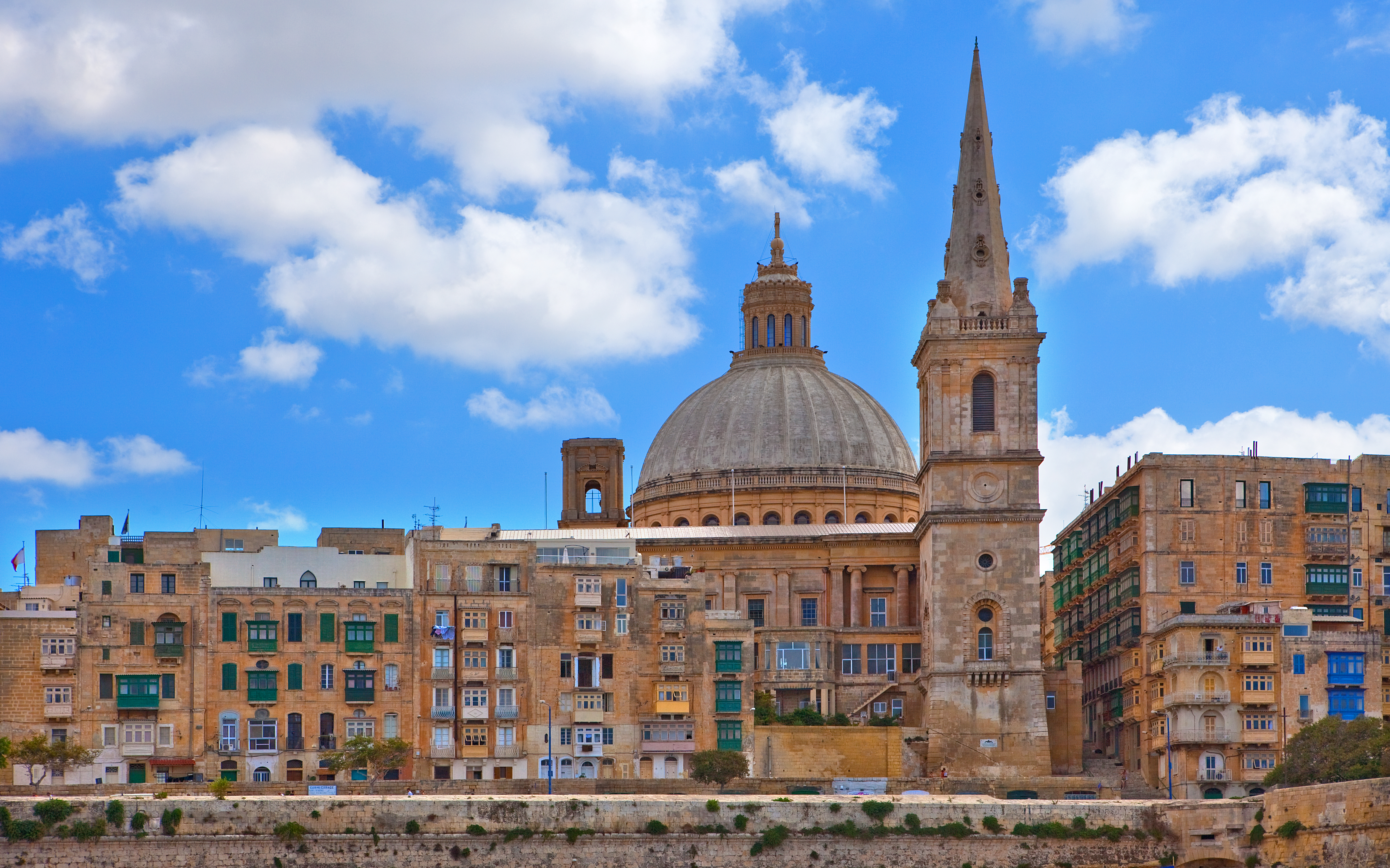 Malta 2010